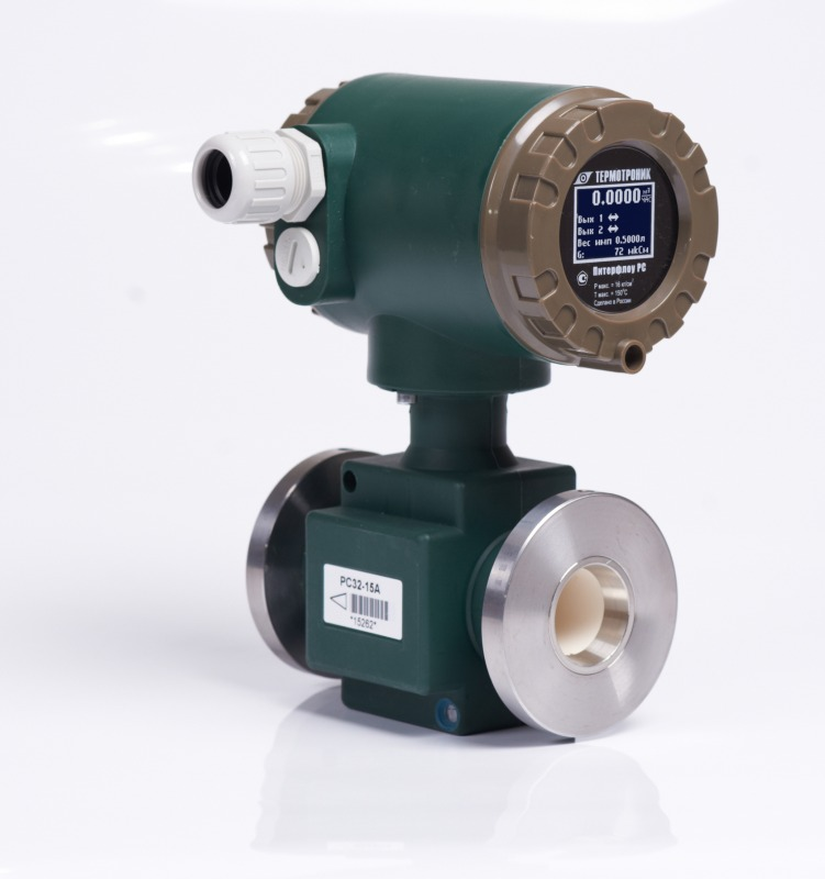 Расходомер электромагнитный